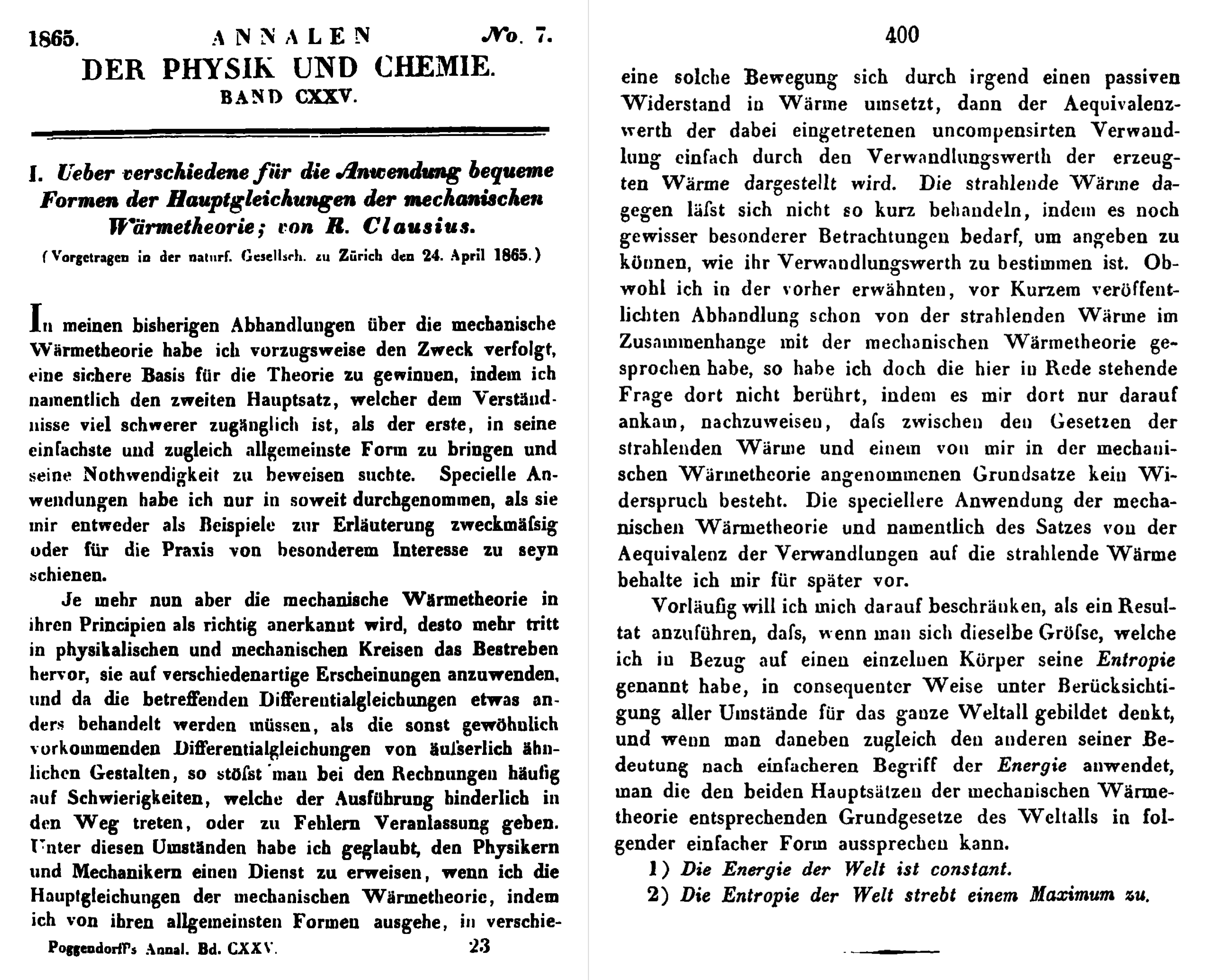 Первое печатное упоминание об энтропии (Clausius R. Ueber verschiedene für die Anwendung bequeme Formen der Hauptgleichungen der mechanischen Wärmetheorie. — Annalen der Physik und Chemie. — 1865. — Bd. 125. — № 7. — S. 353—400). Публикация, после которой этот термин вошёл в понятийный аппарат науки. В этой же статье читатель найдёт и интеграл (неравенство) Клаузиуса, и его же знаменитое высказывание: «Энергия мира постоянна. Энтропия мира стремится к максимуму».